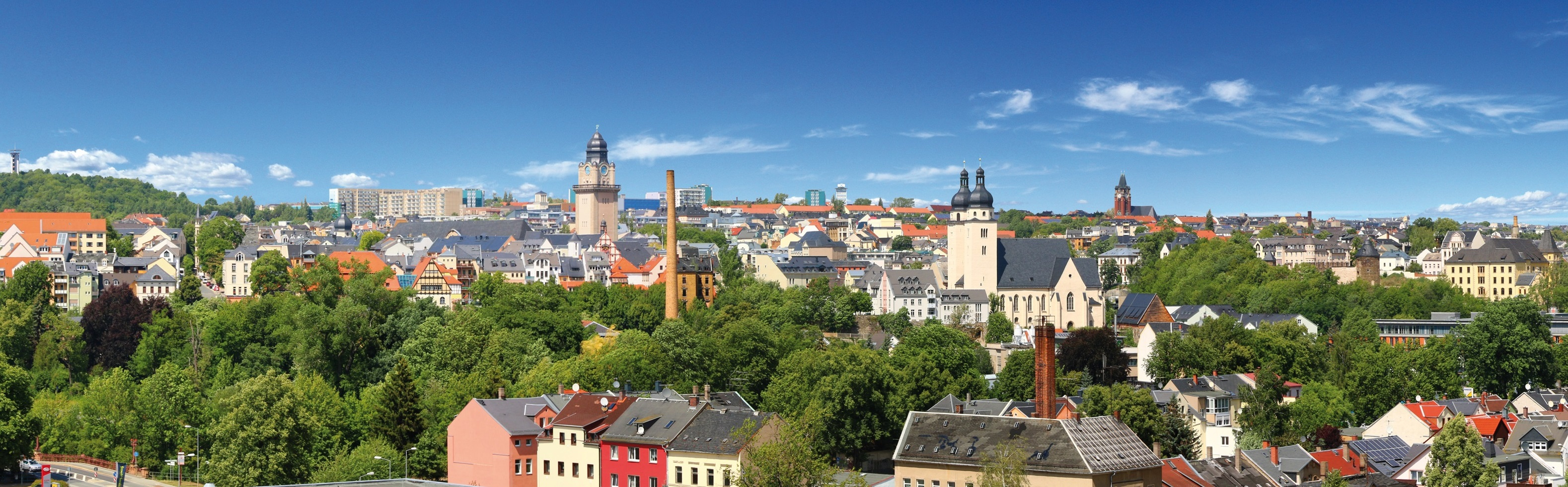 Plauen mit Blick auf das Stadtzentrum